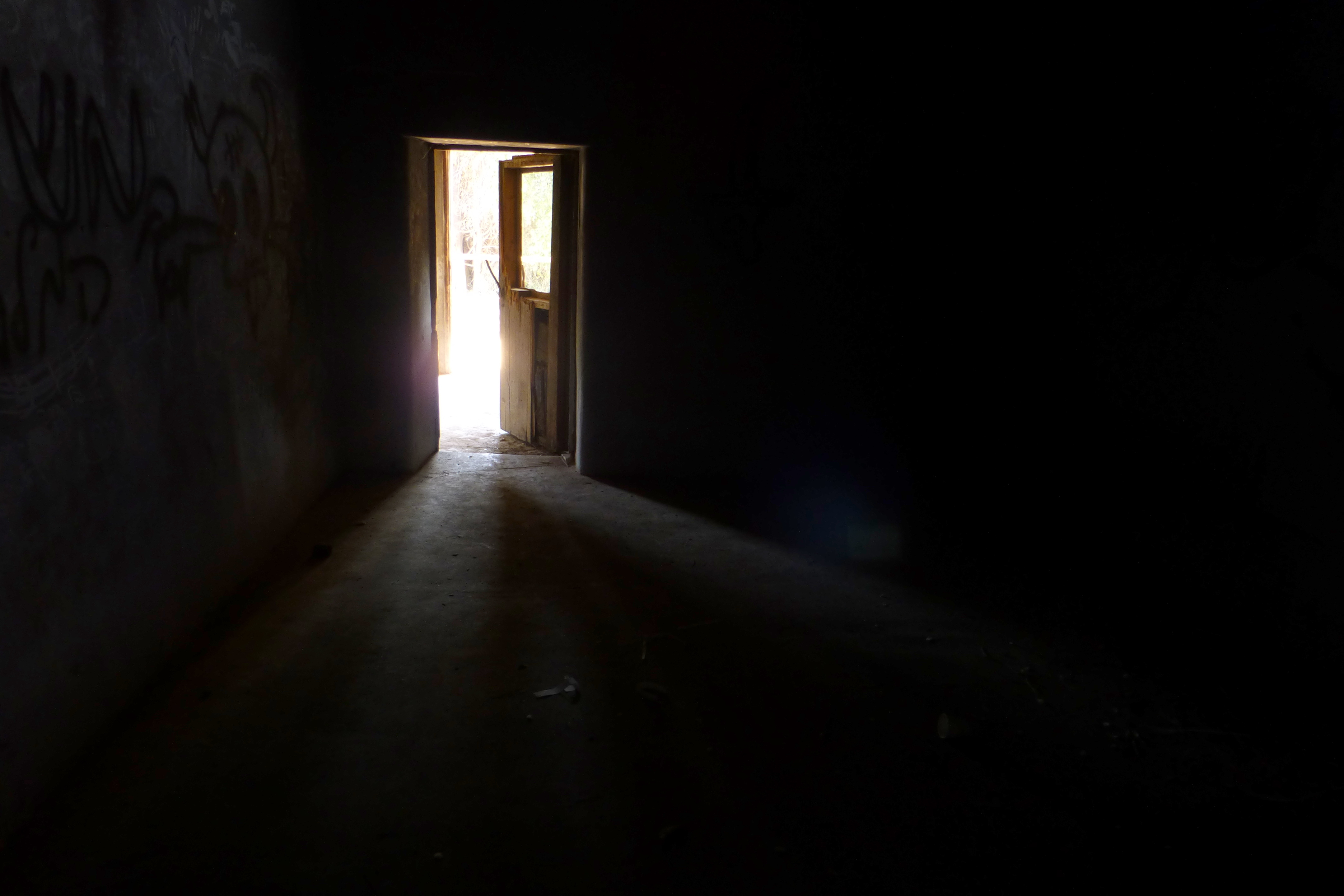 בית הקירור שימש את איכרי הכפר לאיחסון תפוחי אדמה שגידלו. הקיבולת היתה: 80 טון. בהמשך הושכר בית הקירור לשימושם של קיבוצי הסביבה תמורת תשלום. בימי מלחמת השחרור שימוש המקום לאיחסון נשק. בית הקירור אמור לעבור תהליך שימור ולהכיל בתוכו את ארכיון הישוב.